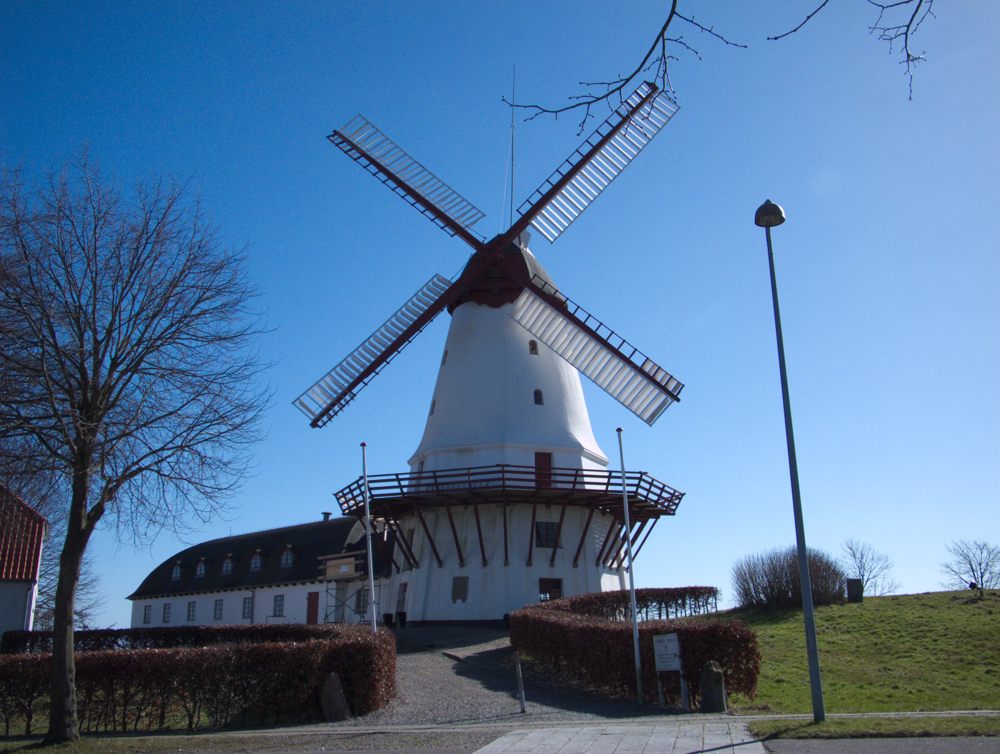 Düppeler Mühle, DänemarkDansk: Dybbøl Mølle, Danmark